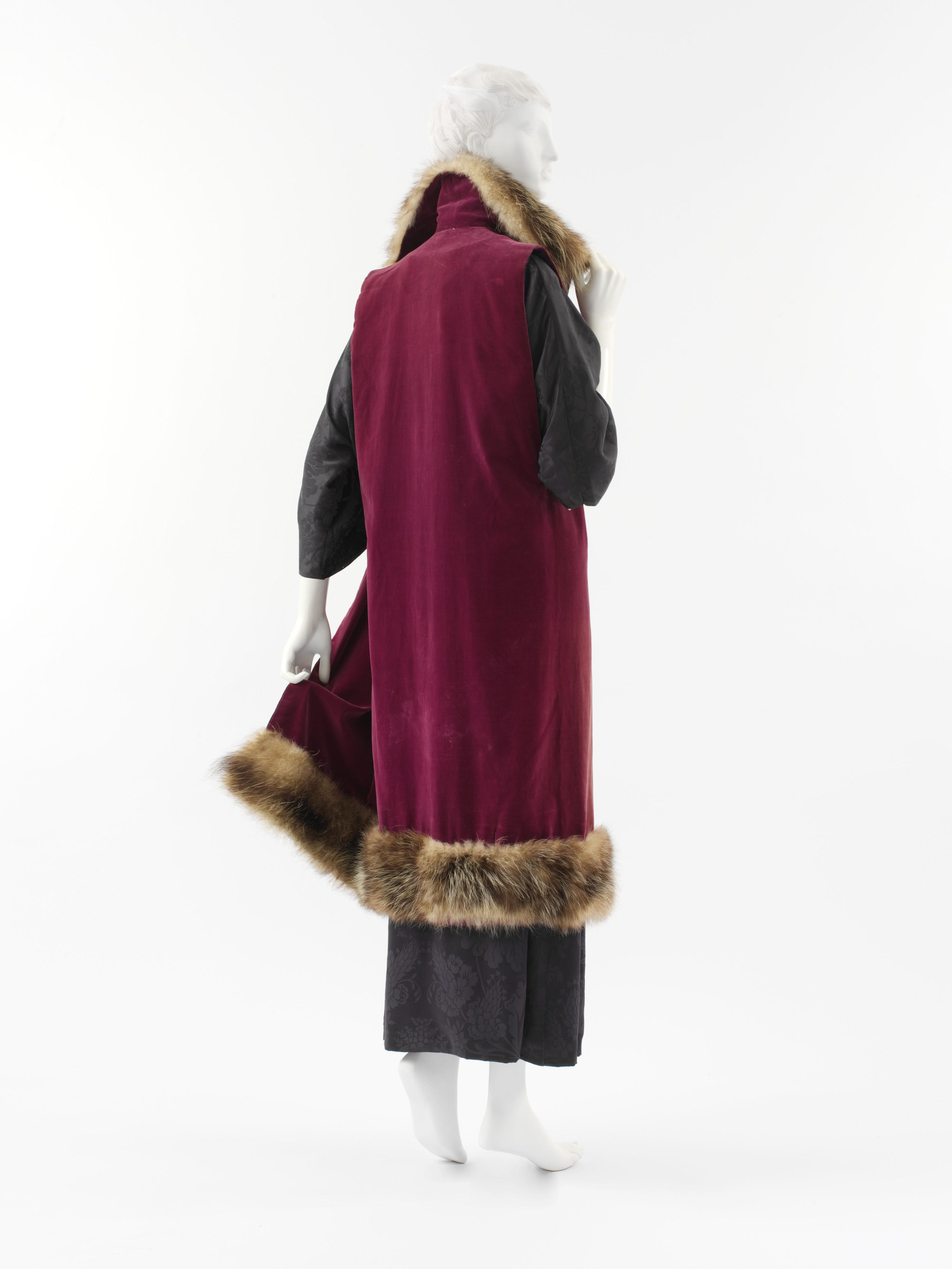 French; Ensemble